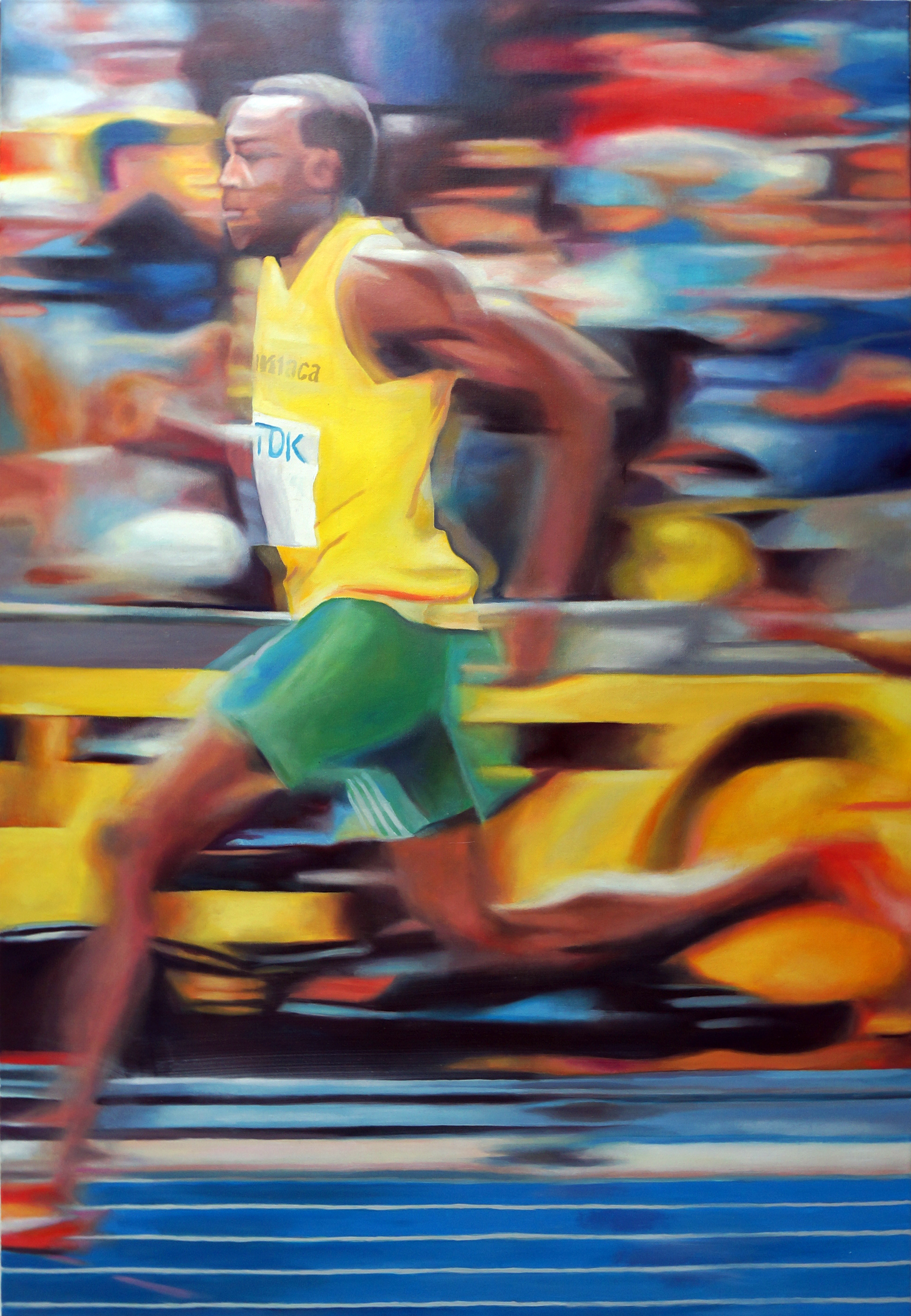 Werner Fohrer sprinter 2015 130x90 sony2